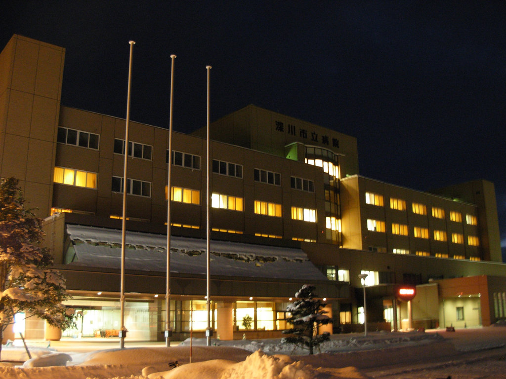 Building of Fukagawa municipal hospital 深川市立病院の建物